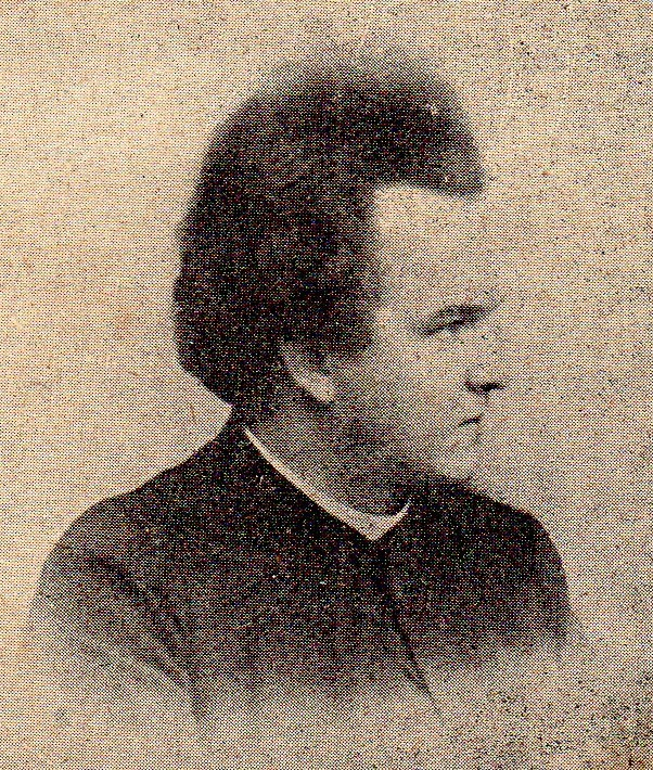 Polski działacz plebiscytowy na Śląsku.